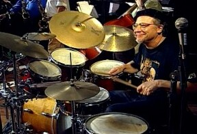 Músico brasileiro Pascoal Meirelles em imagem do acervo da TV Brasil.